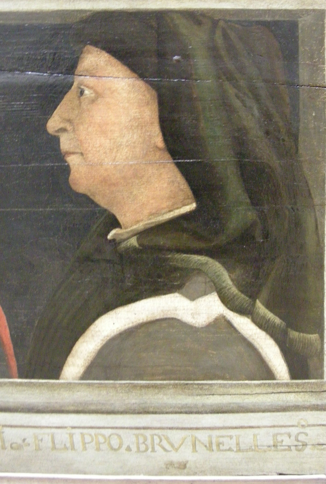 Cinque maestri del rinascimento fiorentino, XVI sec, Filippo Brunelleschi.JPG